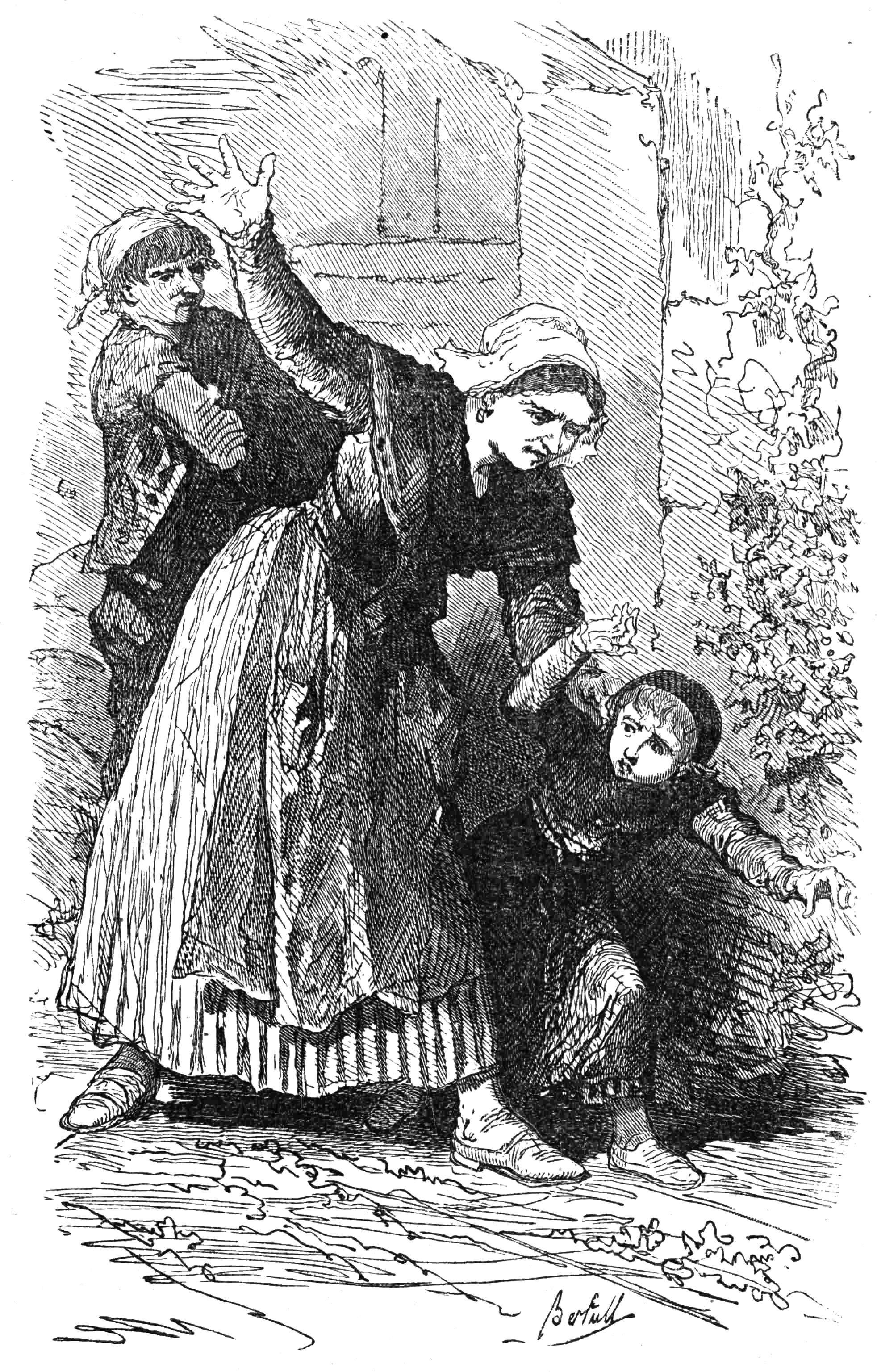 « La mère Léonard s’agite, appelle sa fille, court de la maison au moulin et ramène, en la traînant par le bras, Jeannette qui s’était cachée et qui se débat vivement. » (Page 113) Illustration contenue dans le roman de (wikipedia-FR) Sophie Rostopchine, comtesse de Ségur, Les Petites Filles modèles, (wikisource-FR) Chapitre XI : Jeannette la voleuse.